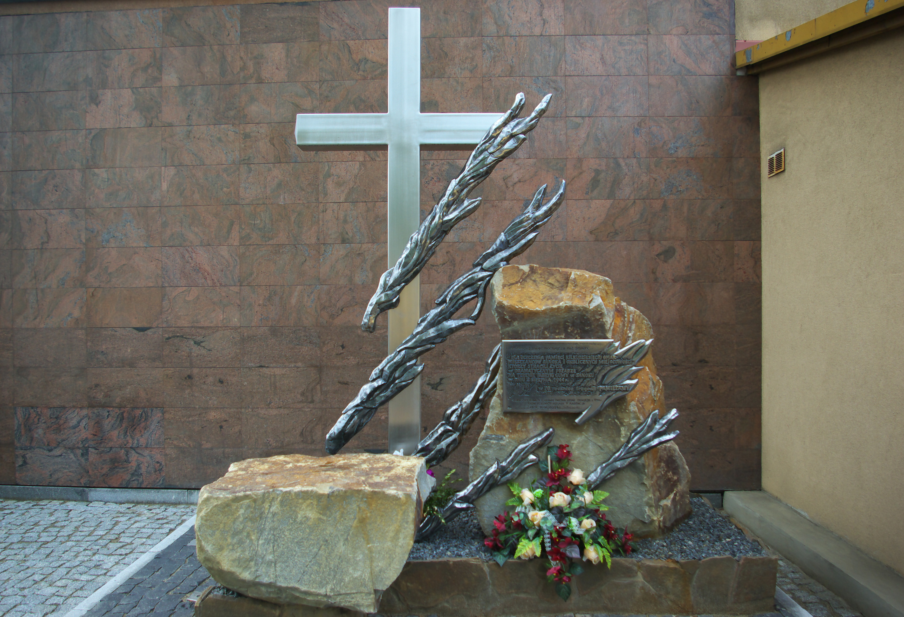 Krzyż pamiątkowy w hołdzie ofiarom pożaru w Fabryce Gumy w Sanoku 2 sierpnia 1944